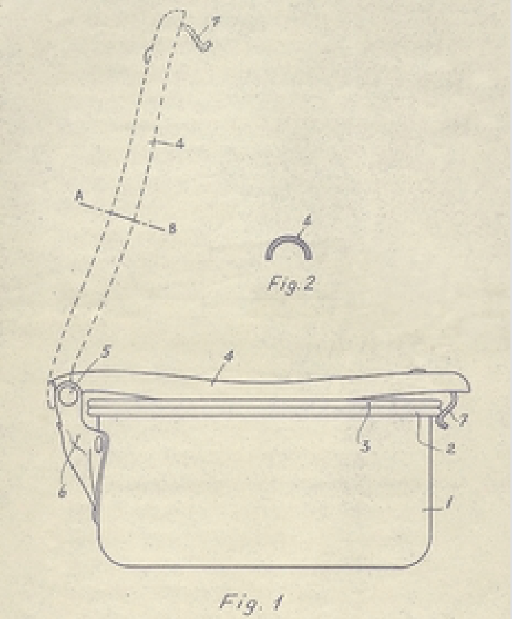 Disegno allegato al brevetto originale del 1952